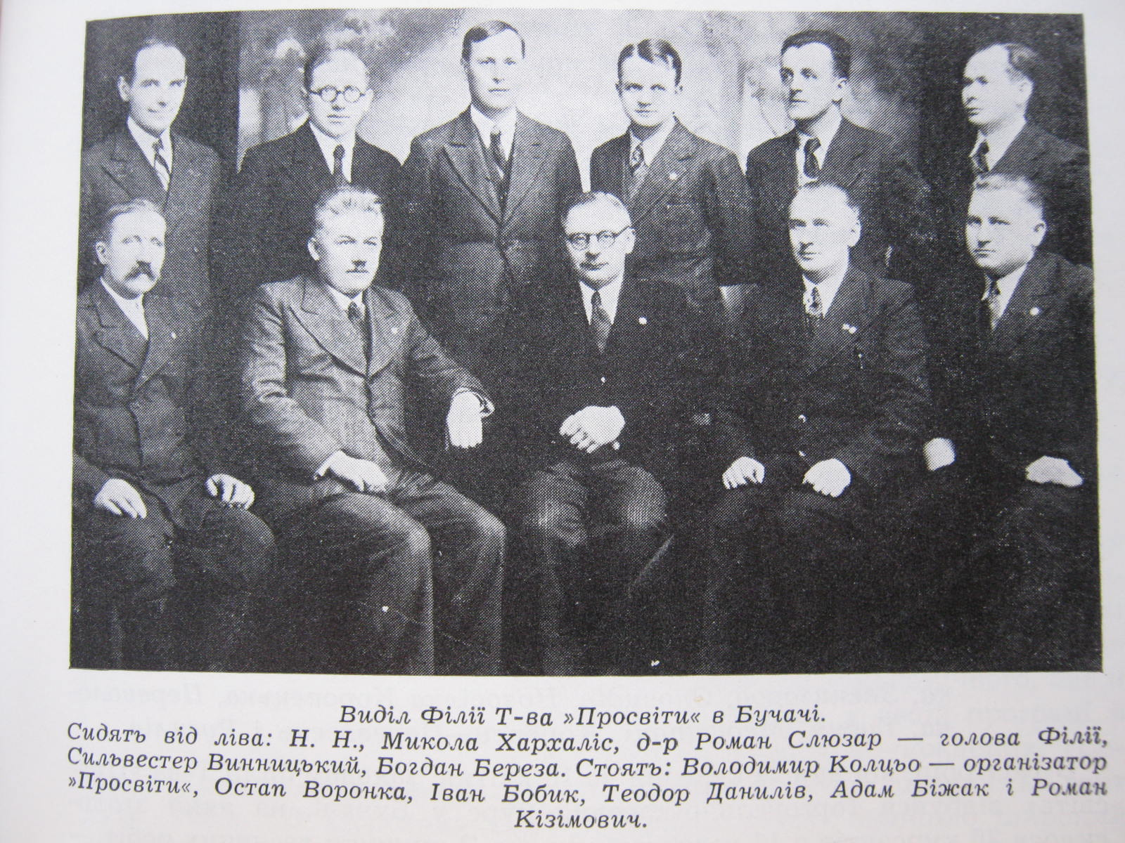 Виділ Філії Т-ва »Просвіти« в Бучачі. Сидять від ліва: Н. Н., Микола Хархаліс, д-р Роман Слюзар — голова Філії, Сильвестер Винницький, Богдан Береза. Стоять: Володимир Колцьо — організатор »Просвіти«, Остап Воронка, Іван Бобик, Теодор Данилів, Адам Біжак і Роман Кізімович.